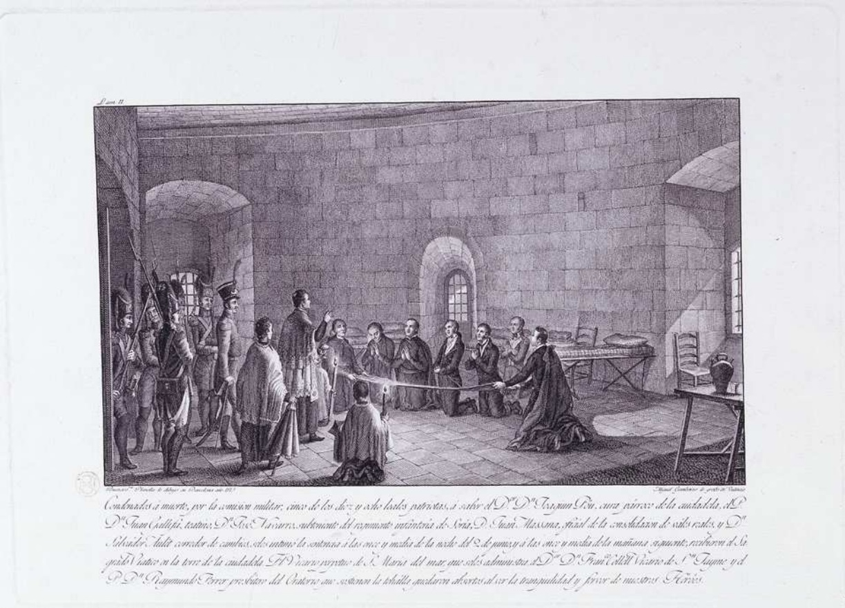 Conspiración contra los franceses en Barcelona 1809, gravure de Miguel Gamborino d'après un dessin de Buenaventura Planella. ca. 1815. Eau-forte et burin. Bibliothèque nationale d'Espagne.